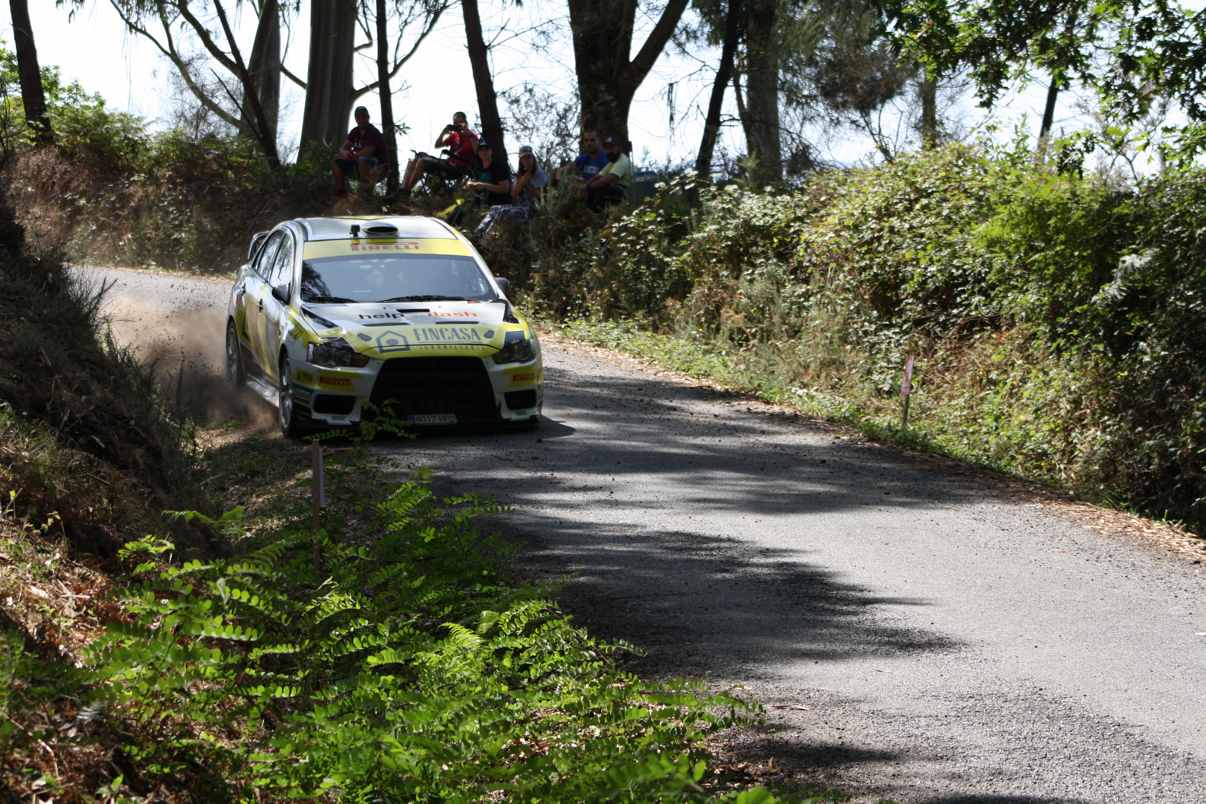 Rally Botafumeiro 2018. Tramo de Sarandón.